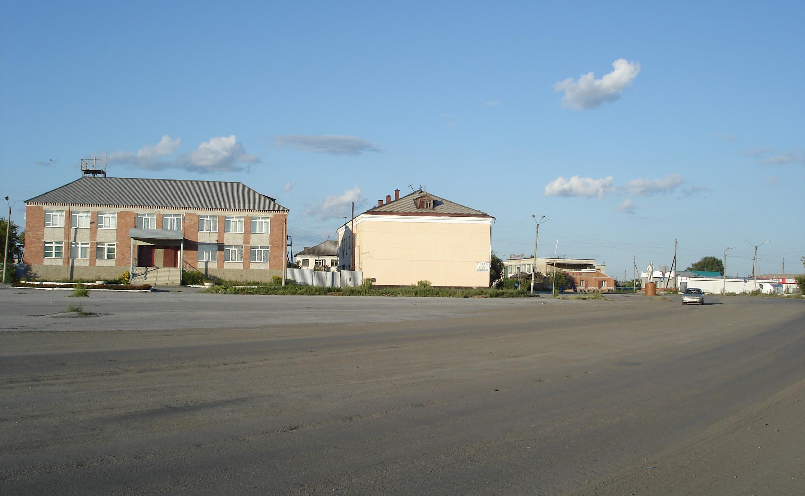 Центральная улица